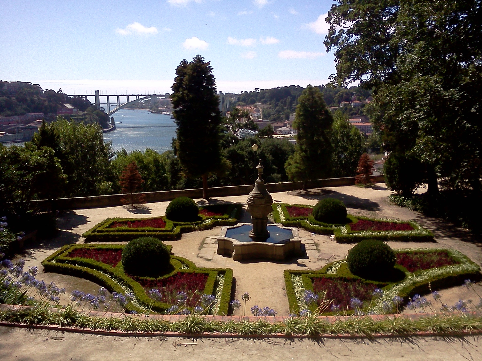 Jardins do Palácio de Cristal